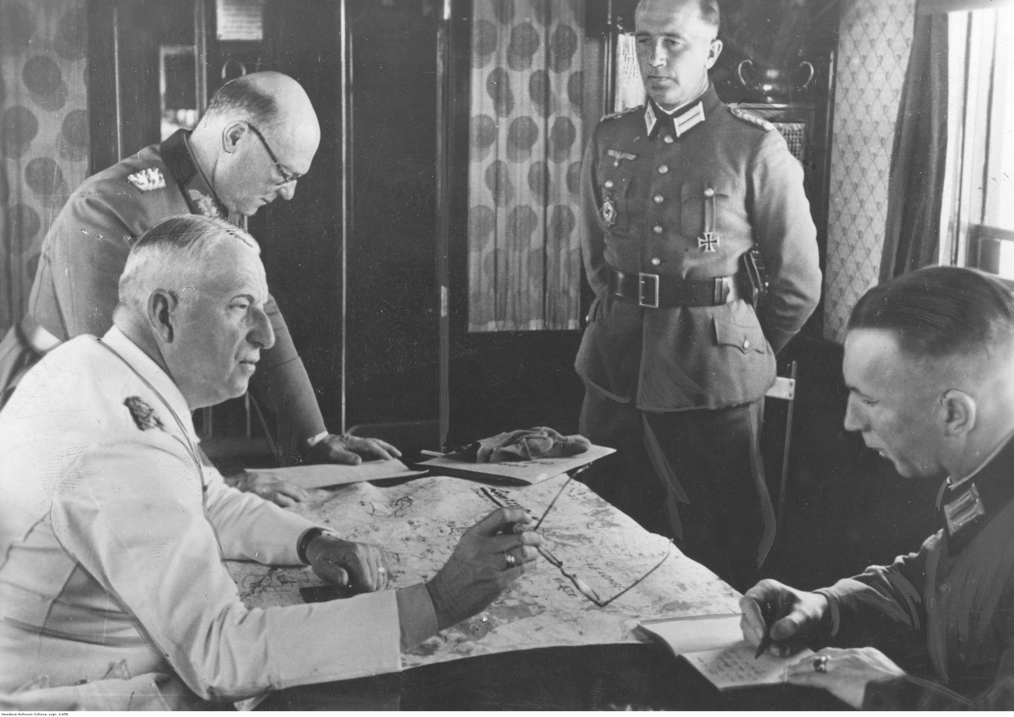 Narada oficerów niemieckich w pociągu specjalnym marszałka Ericha von Mansteina (1 z lewej). Widoczny także gen. Karl Adolf Hollidt (w okularach). Jeden z oficerów notuje polecenia marszałka.